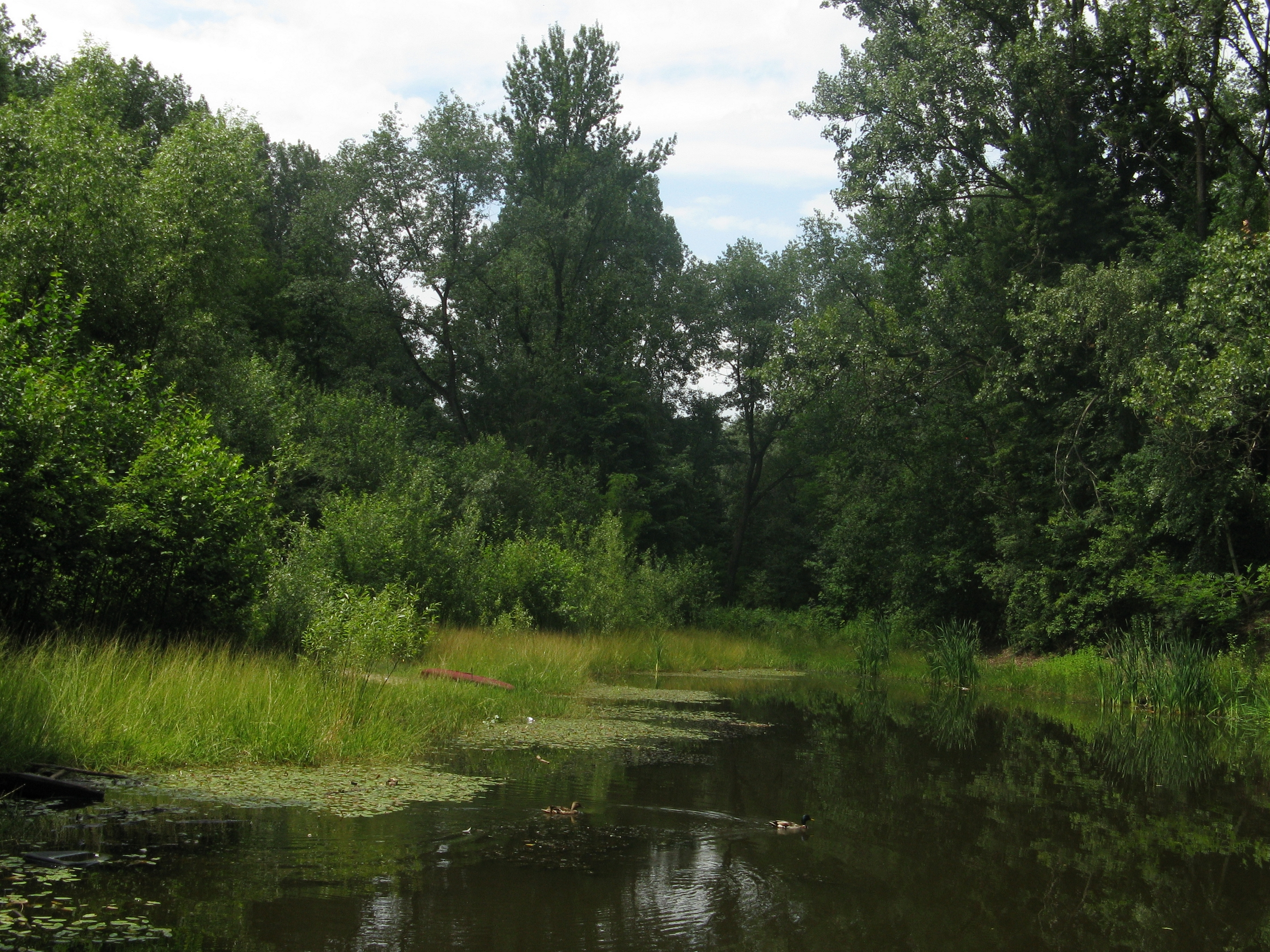 Staw w Lasku Chropaczowskim w Świętochłowicach-Chropaczowie.